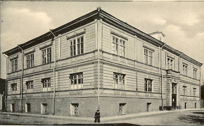 Narva Tütarlaste gümnaasium